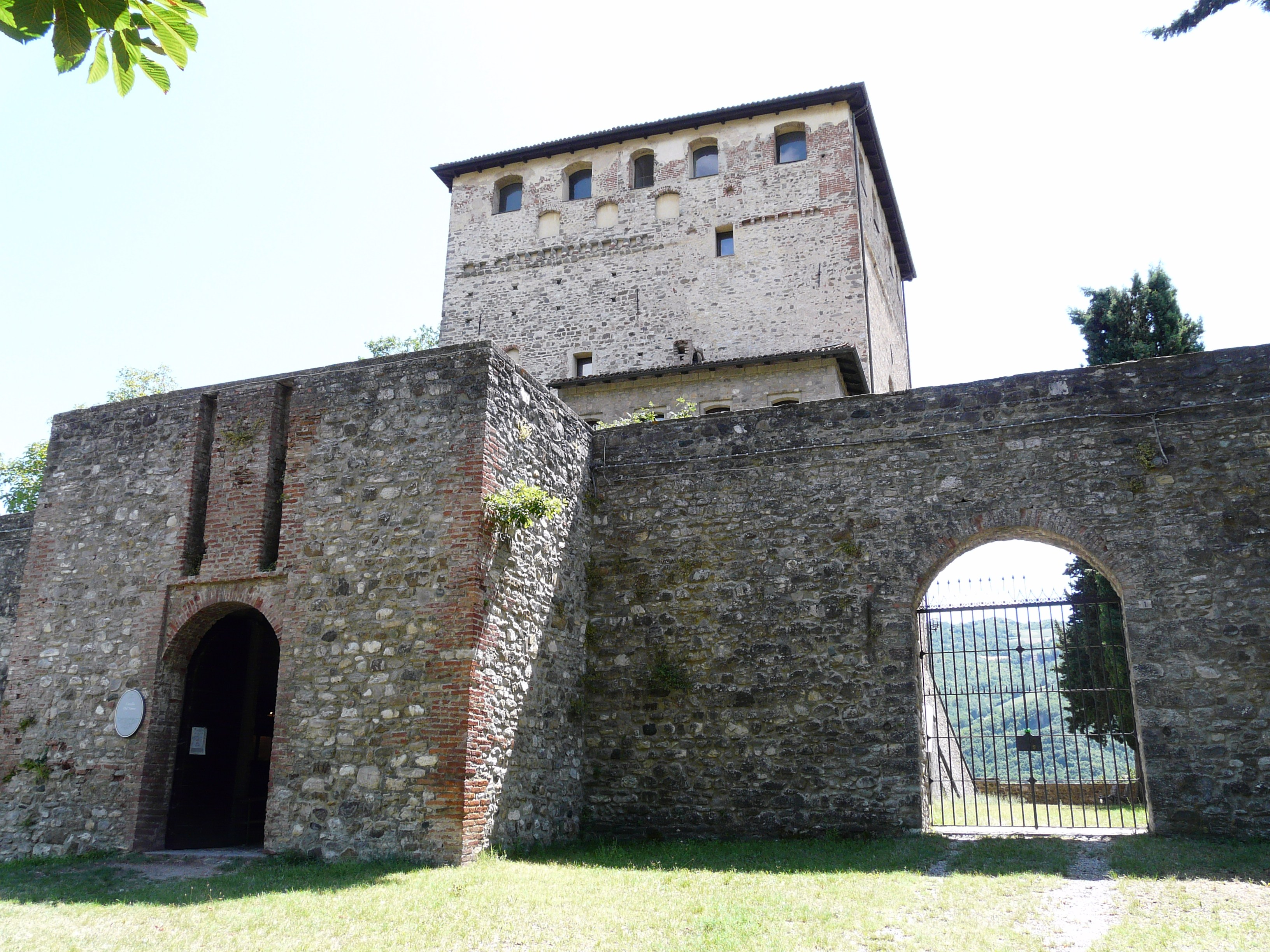 Immagini del castello malaspiniano di Bobbio, Emilia-Romagna, Italia